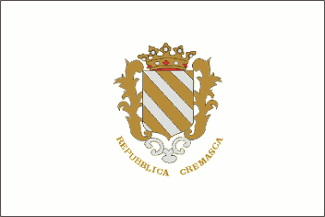 Bandera de la República Cremasca